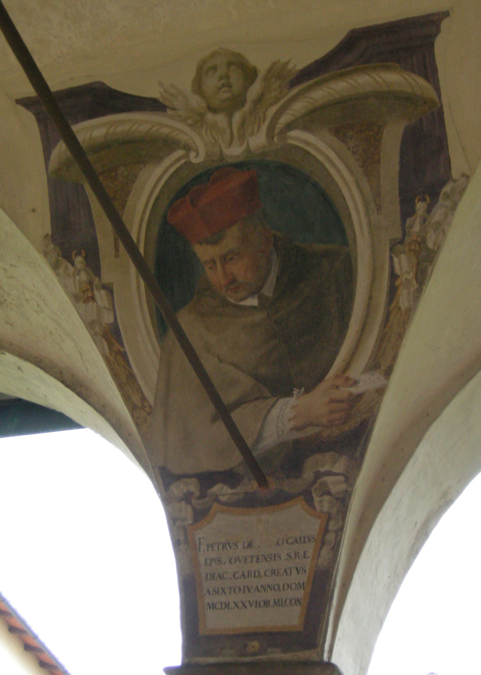 Chiostro di ognissanti, personalità francescane 38 Pierre de Foix